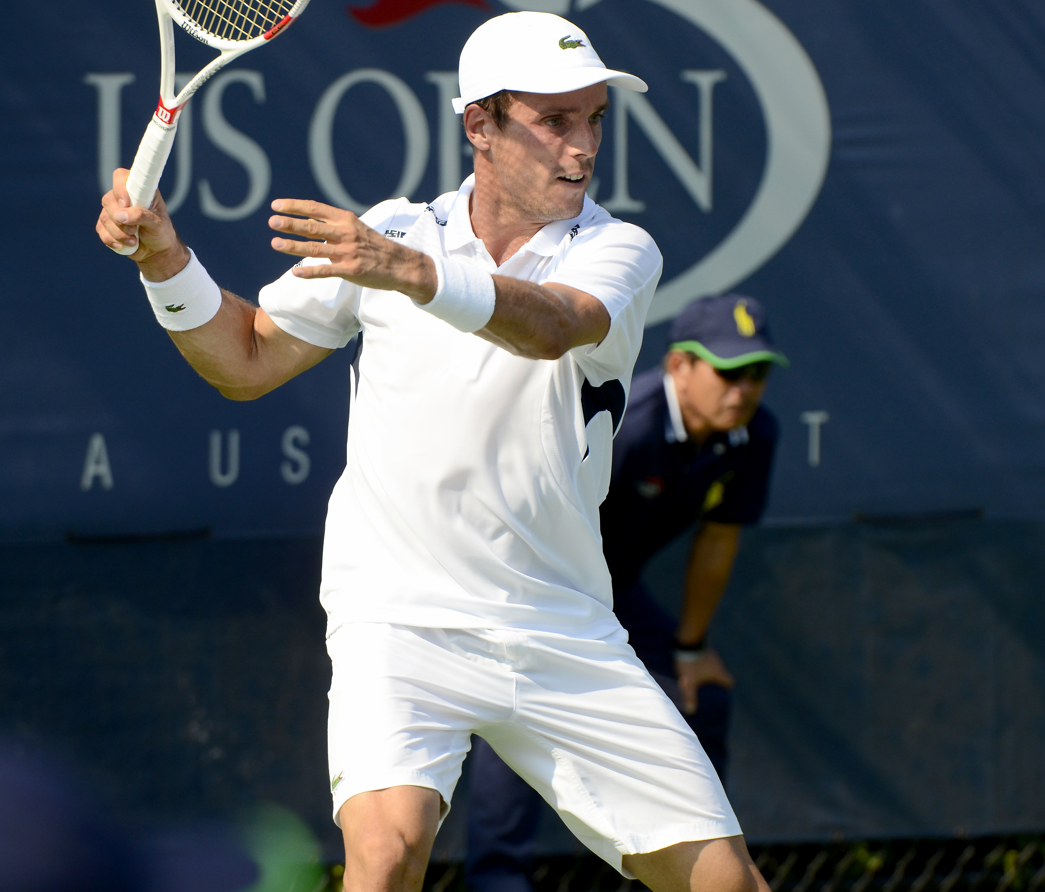 August 26, 2014 Queens, NY Roberto Bautista Agut (ESP) def. Andreas Haider-Maurer (AUT)